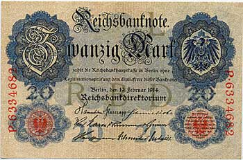 Банкнота 20 немецких марок 1914 года. Аверс